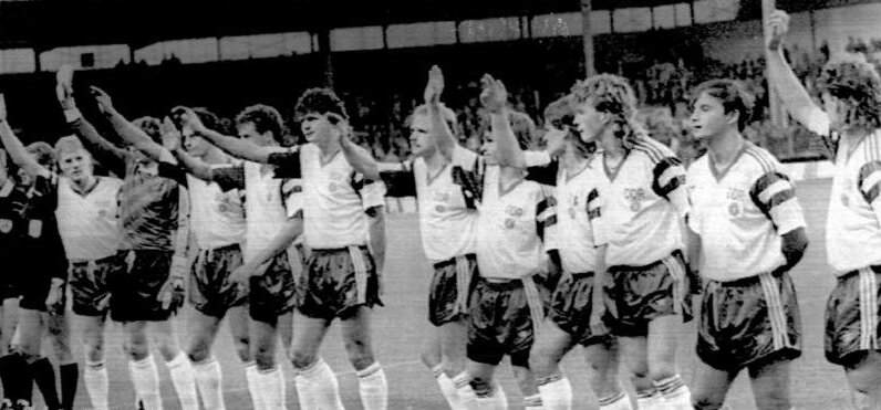 Abschied der DDR-Nationalmannschaft Mit einem überraschenden 2:0 (0:0)-Sieg gegen den WM-Teilnehmer Belgien verabschiedete sich die DDR-Nationalmannschaft im Vanden-Stock-Stadion Anderlecht für immer von der internationalen Szene. Vor rund 10.000 war im 293. und gleichzeitig letzten Länderspiel der Ex-Dresdner und Mannschaftskapitän Matthias Sammer (3.v.l.) der Schütze beider Tore. Abgebildete Personen: Sammer, Matthias: Fußballspieler, Fußballtrainer, Bundesrepublik Deutschland (GND 123137829)